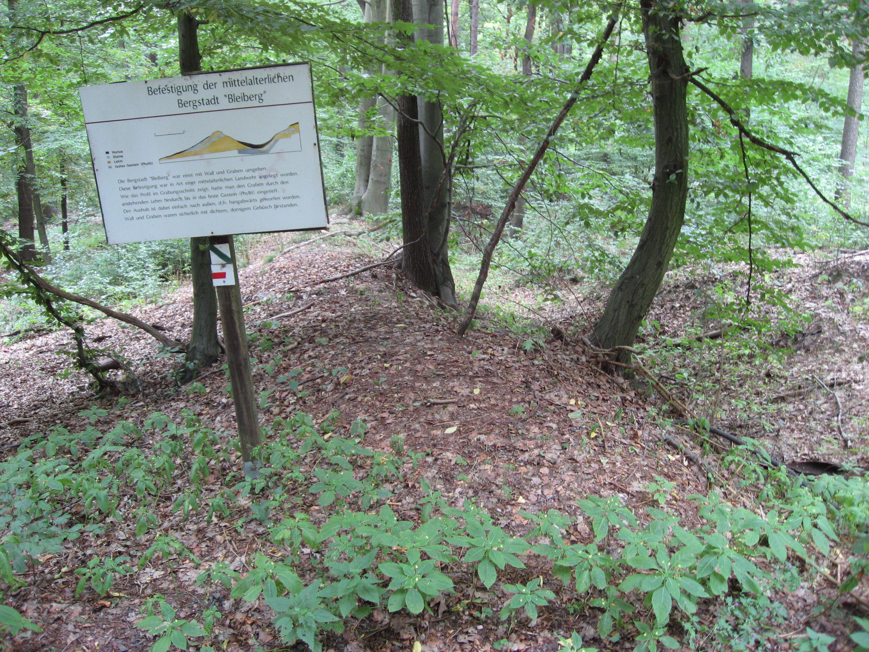 Befestigungsgraben der mittelalterlichen Stadt Bleiberg.